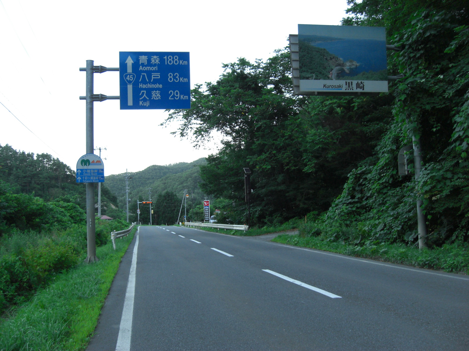 普代村 郊外